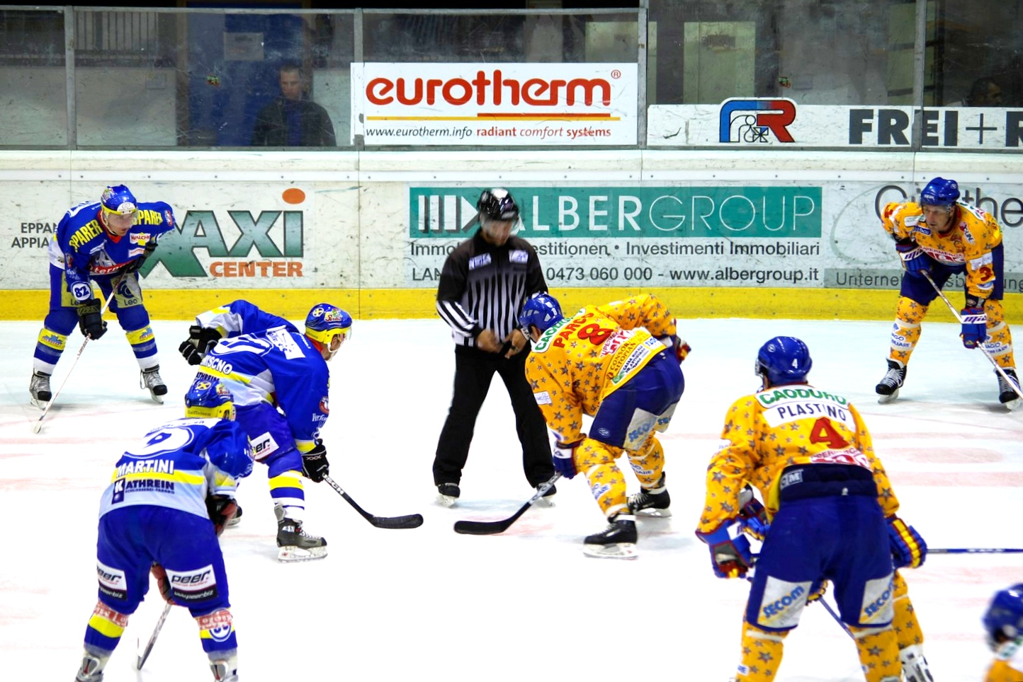 Spieler beim Puckeinwurf (Bully)